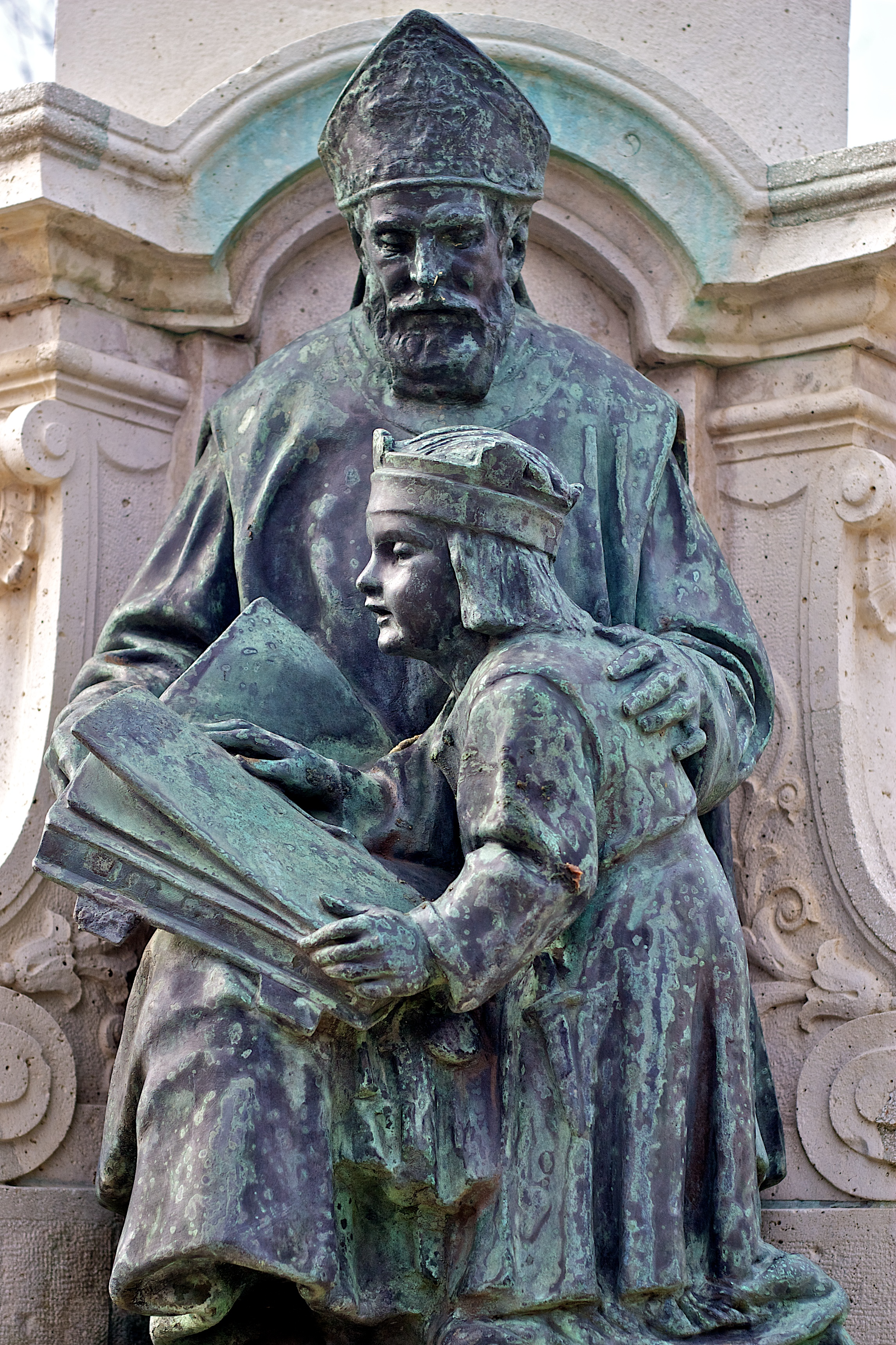 Székesfehérvár. - Szent Gelért Szent Imre herceg nevelője. Székesfehérvár. Püspökkút Memorial Column detail, Saint Gerard educator of Saint Emeric of Hungary